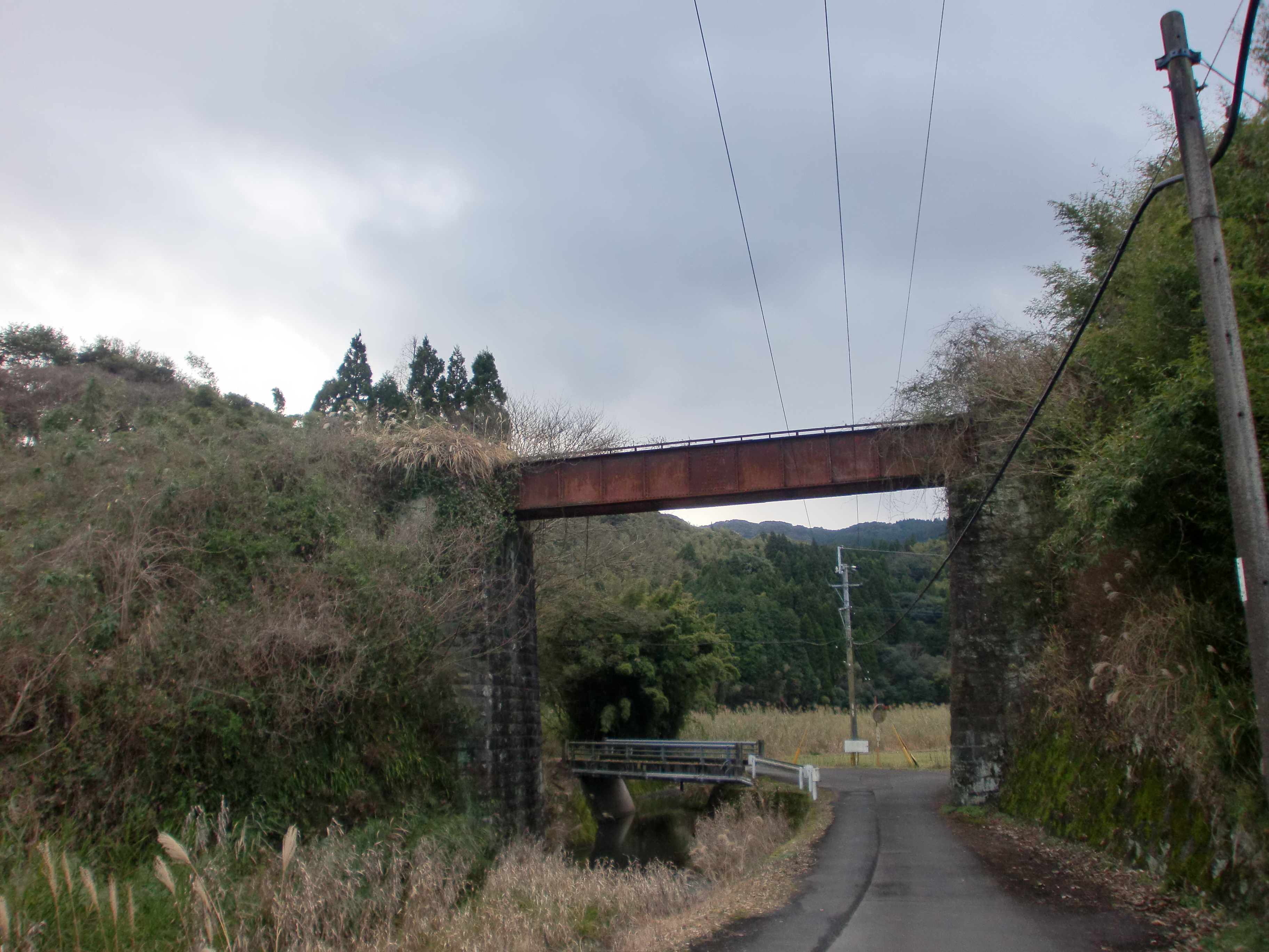 宮之城線の鉄橋跡（薩摩川内市中村町）。向かって左方向が薩摩大口方面、右方向が川内方面。